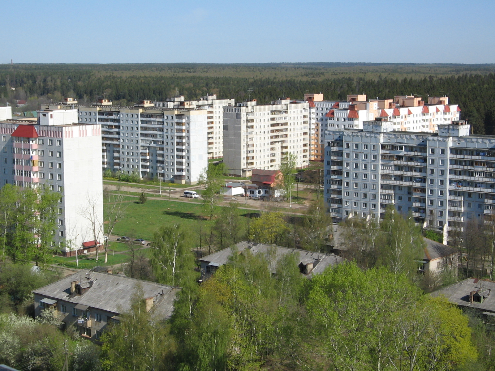 Вид на Городок-17 (Большие Вязёмы)